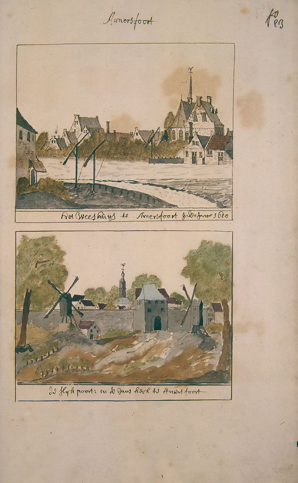 Beschreijvinge van Het Stigt van Utrecht Derselver Steeden, dorpen en Gehugten Meest alle naar het leeven geteekend, en met een Korte aantekening, verrijkt en tot dusdaanigen Standt Gebraagt Door Andries Schoemaker 1733